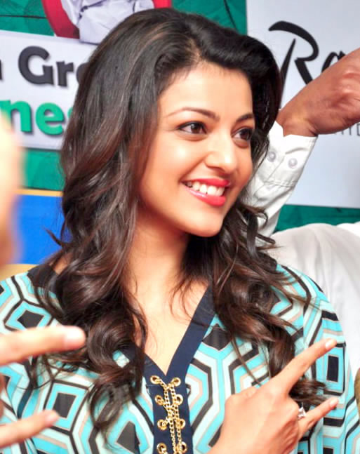 Kajal Aggarwal launches 'BIG Green Ganesha'